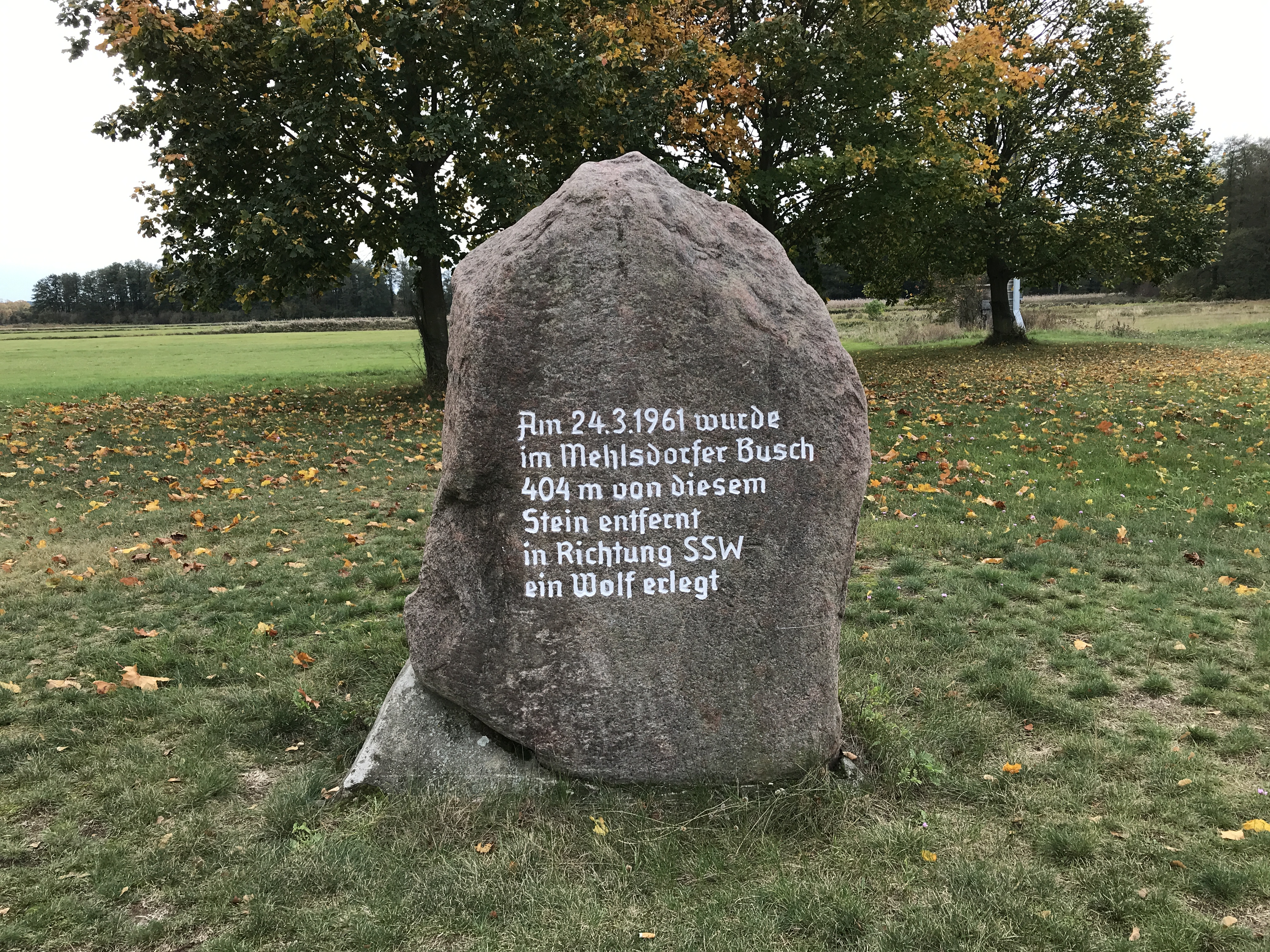 Mehlsdorf, ein Ortsteil der Gemeinde Ihlow im Landkreis Teltow-Fläming in Brandenburg